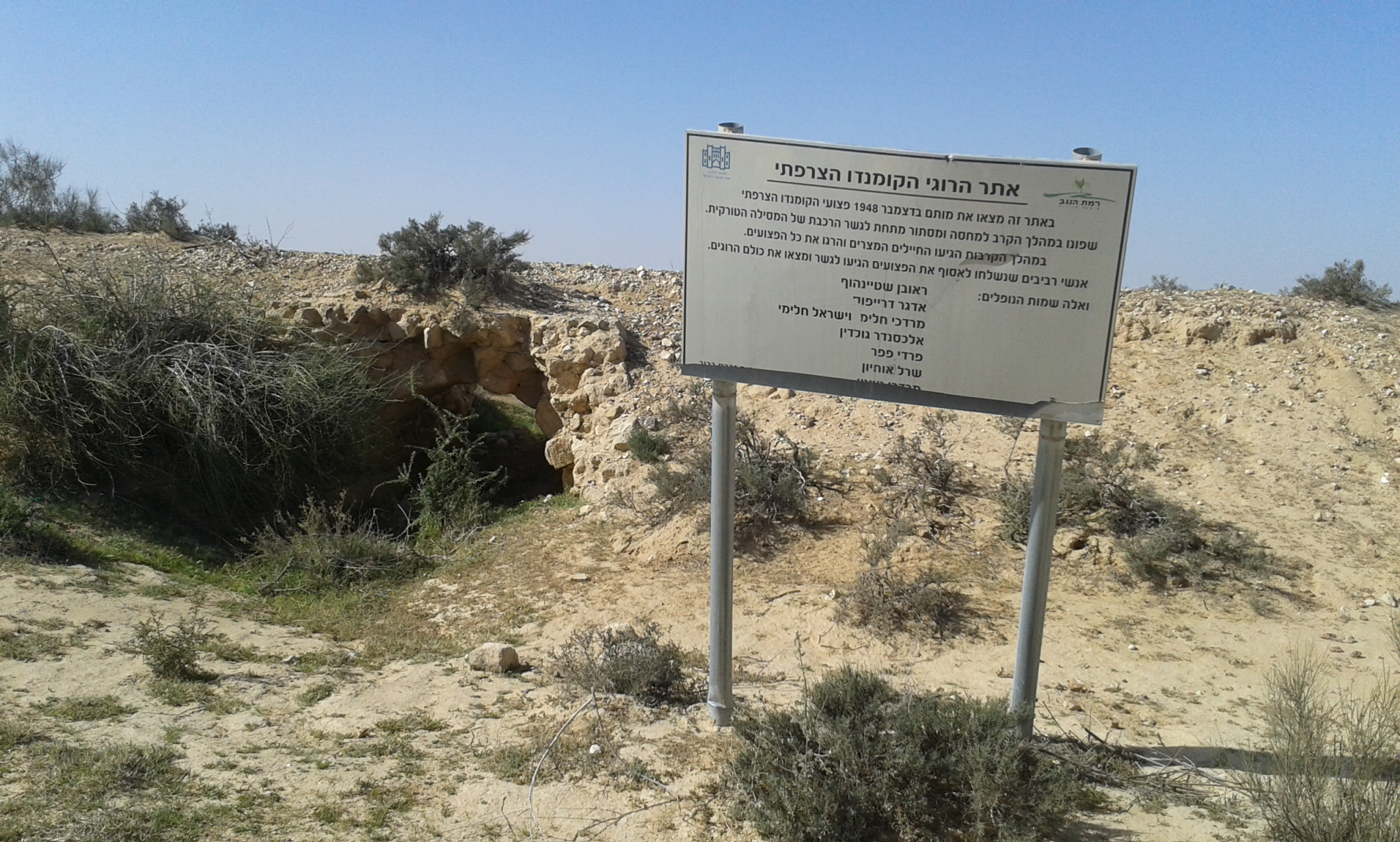 אתר הזכרון לחללי הקומנדו הצרפתי - הגשר תחתיו נרצחו החילים